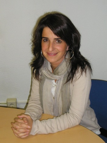 Aintzane Ezenarro politikaria